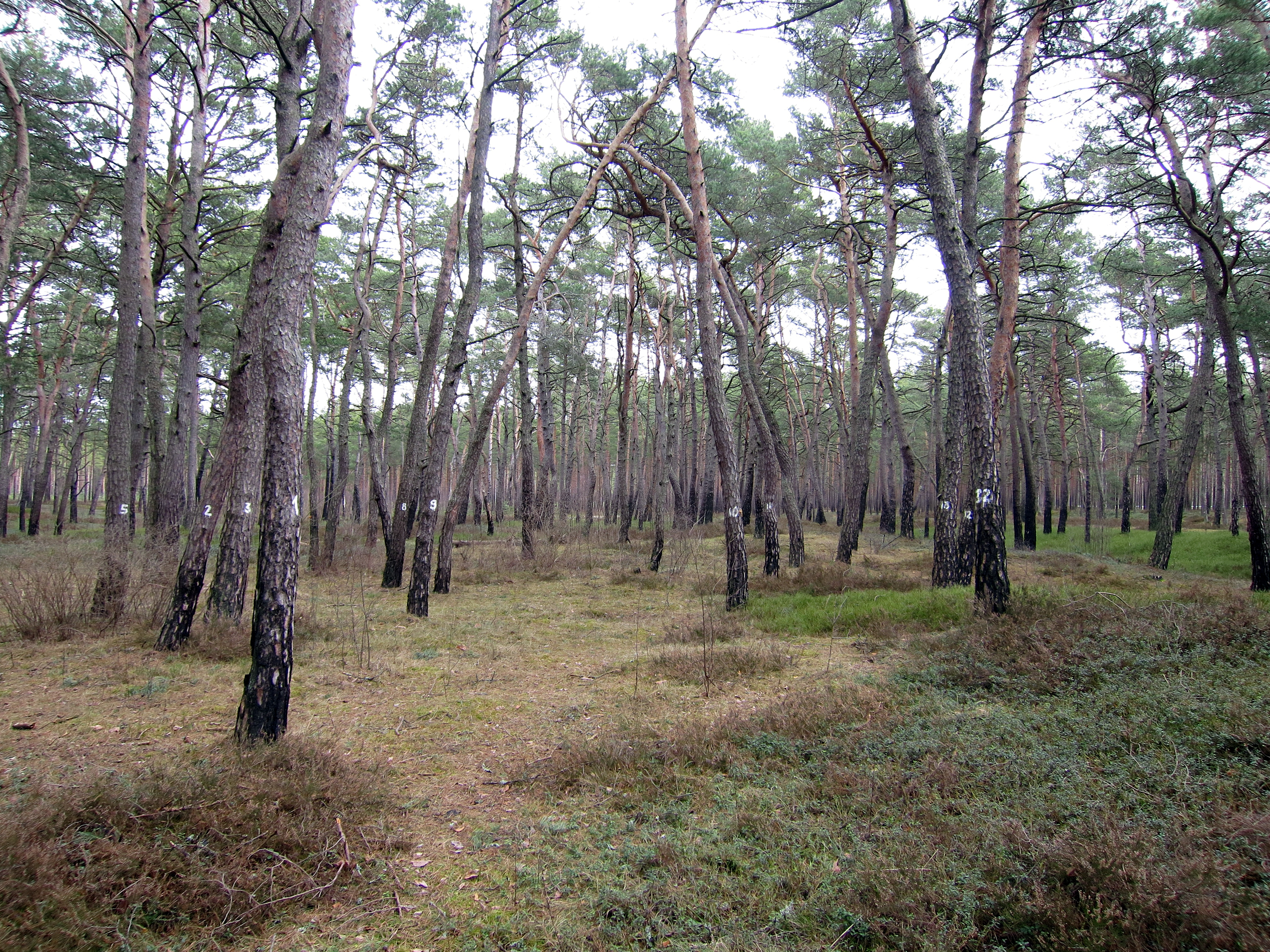 Darmštates priežu audze Jūrmalā.